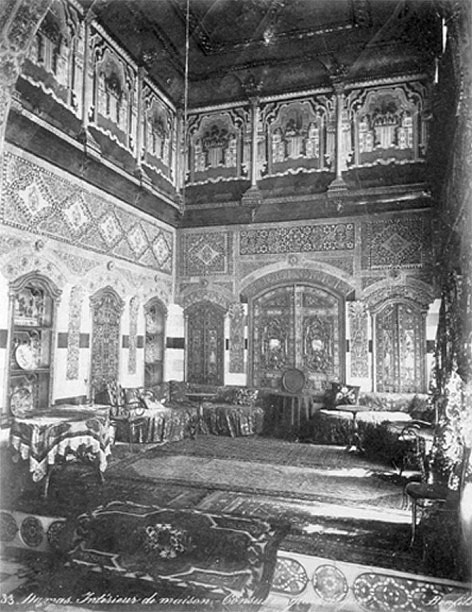 صالون بيت نظام بونفيلس 1870